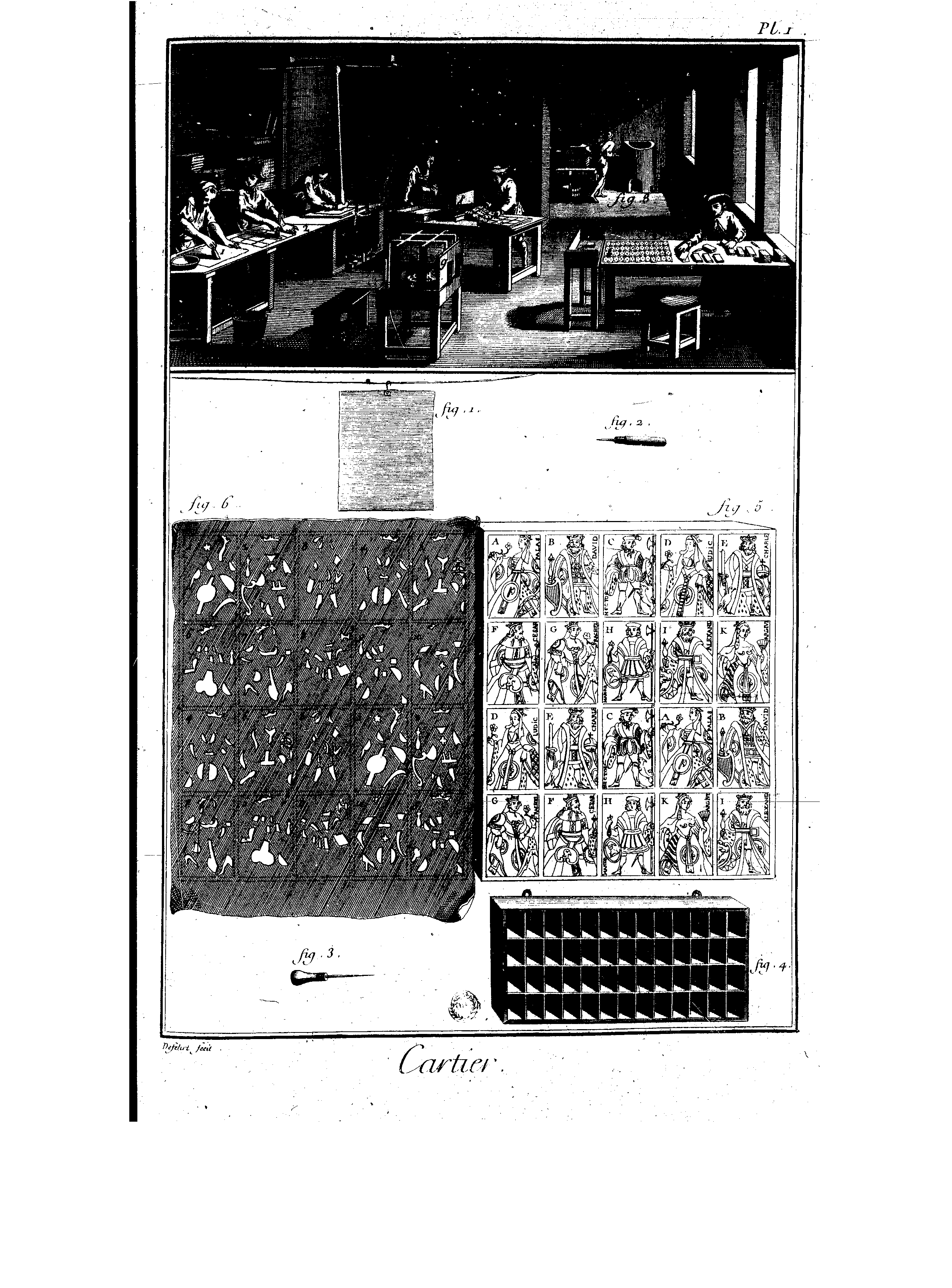 Planches de l'Encyclopédie de Diderot et d'Alembert, volume 2